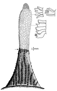 Mental barbel of Shortbeard plunderfish Pogonophryne brevibarbata, female (dorsal view), 325 mm TL, 262 mm SL, Ross Sea, Antarctica